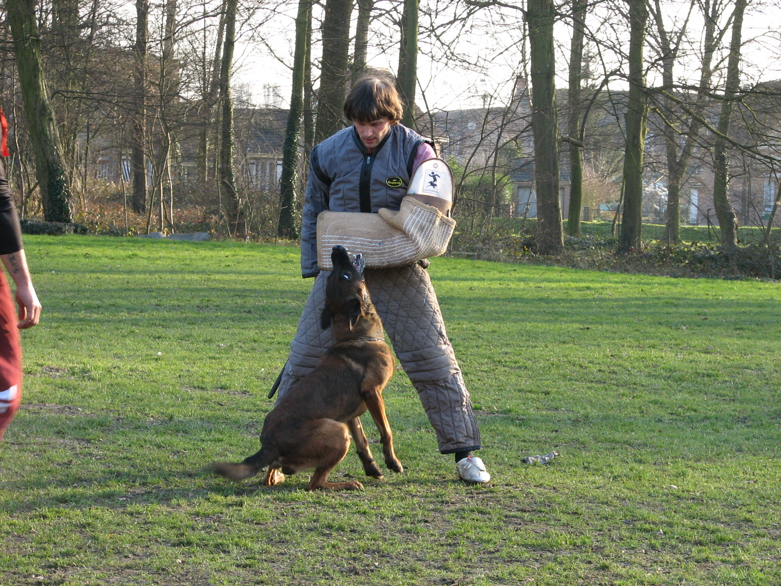 Pilou en ejercicio de defensa